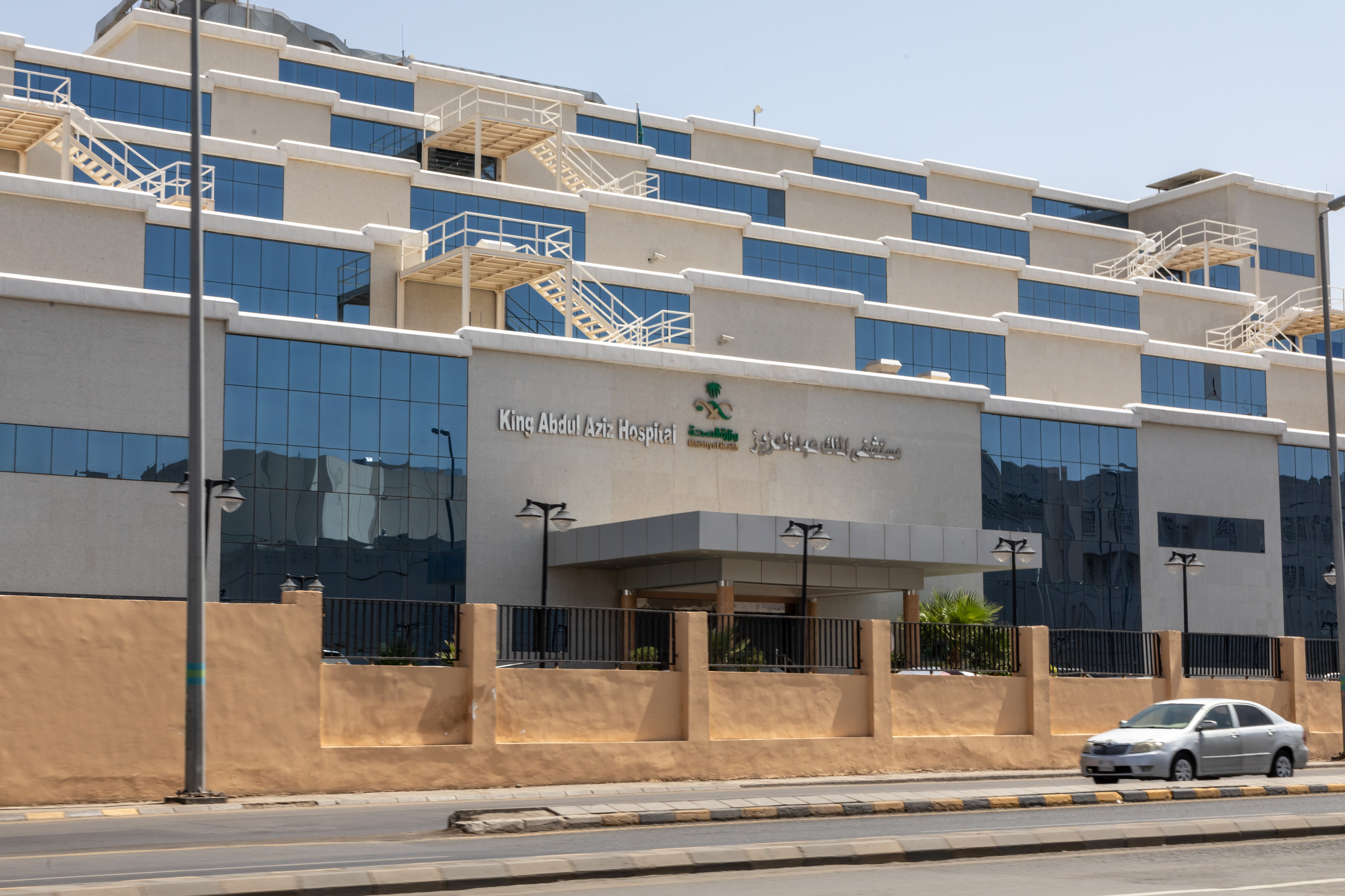 مستشفى الملك عبد العزيز في مكة المكرمة